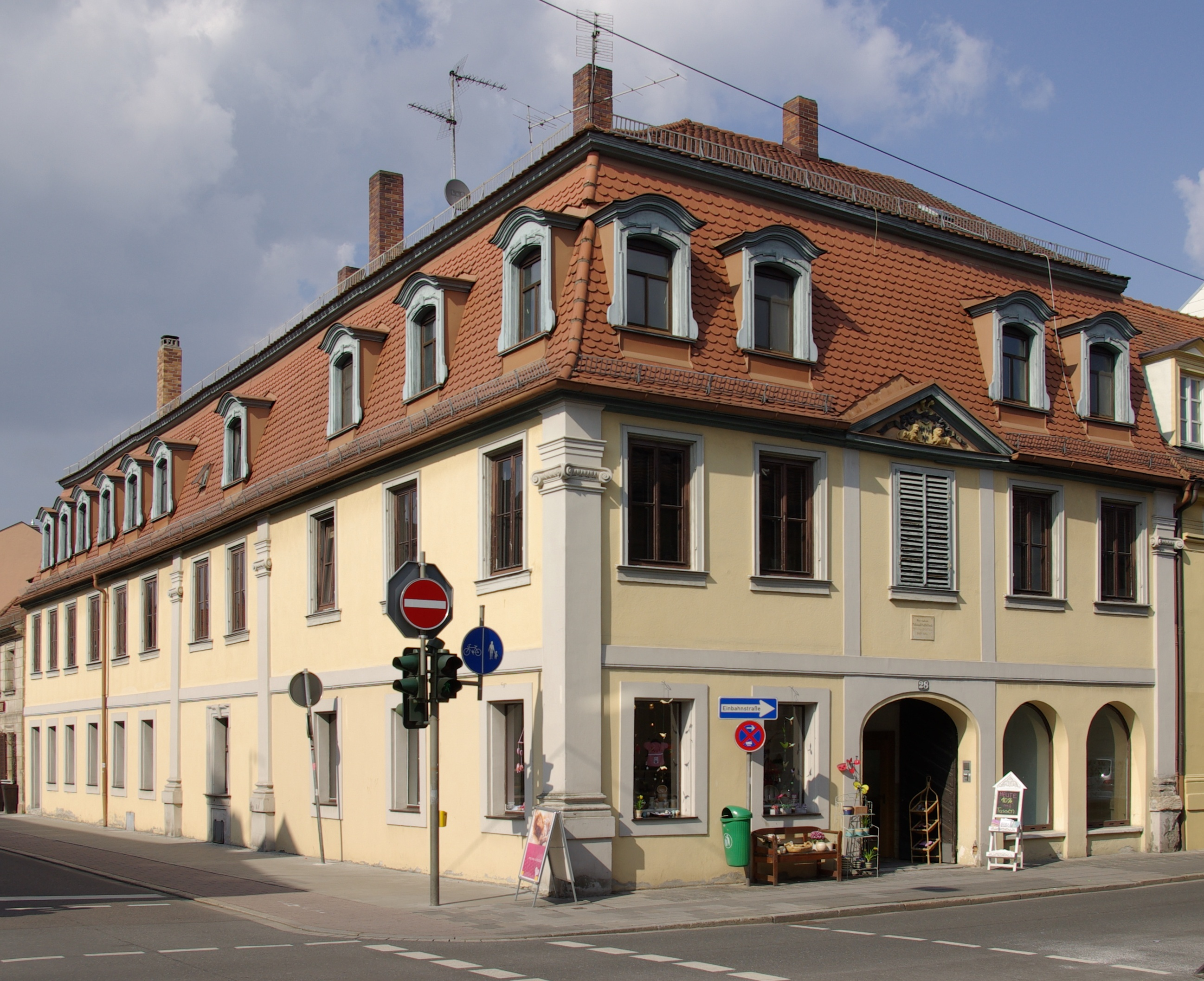 Bünausches Palais in der Friedrichstraße 28 / Ecke Fahrstraße in Erlangen